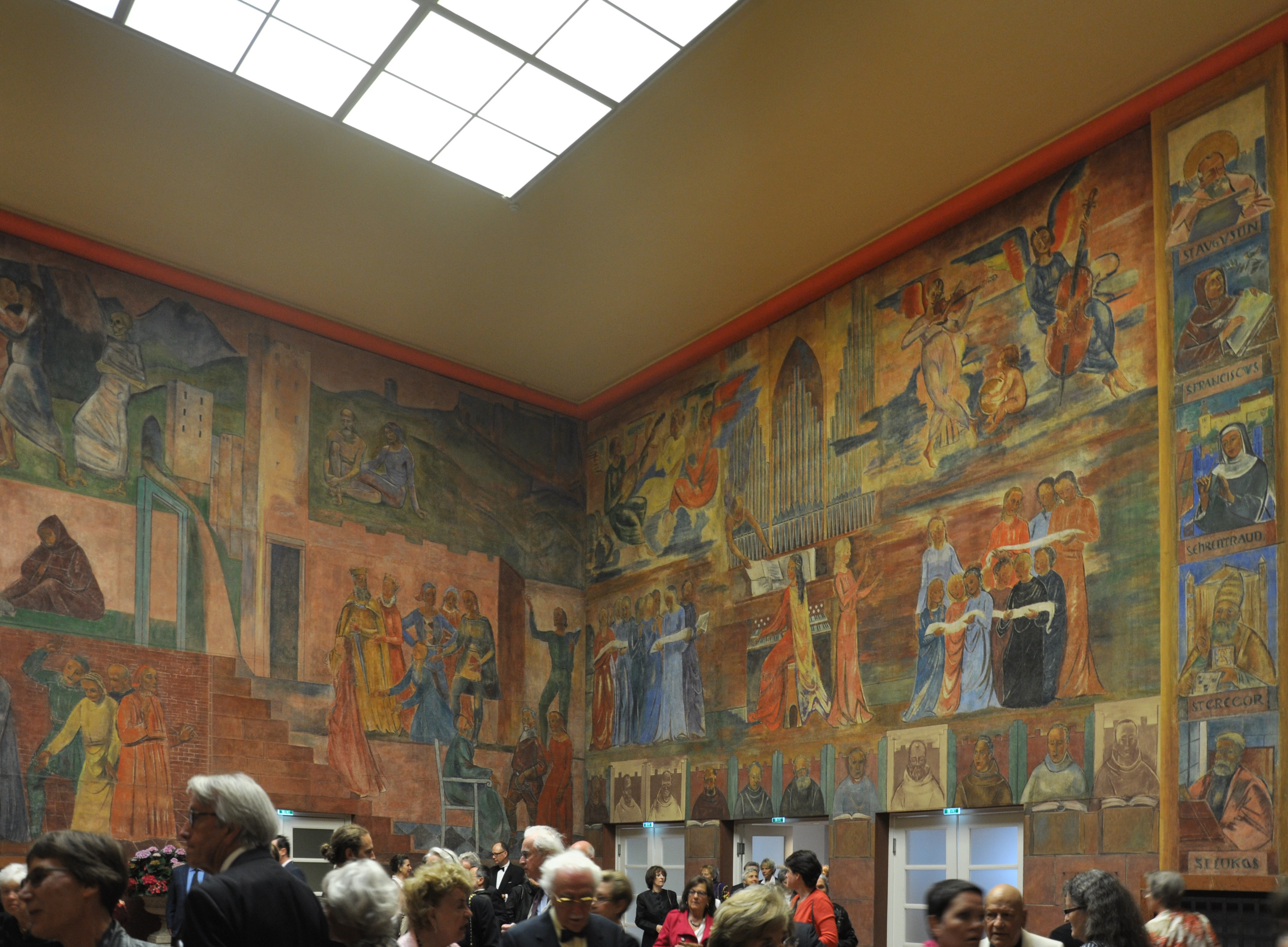 Salzburg, Festspielhauskomplex, Faistauer-Foyer